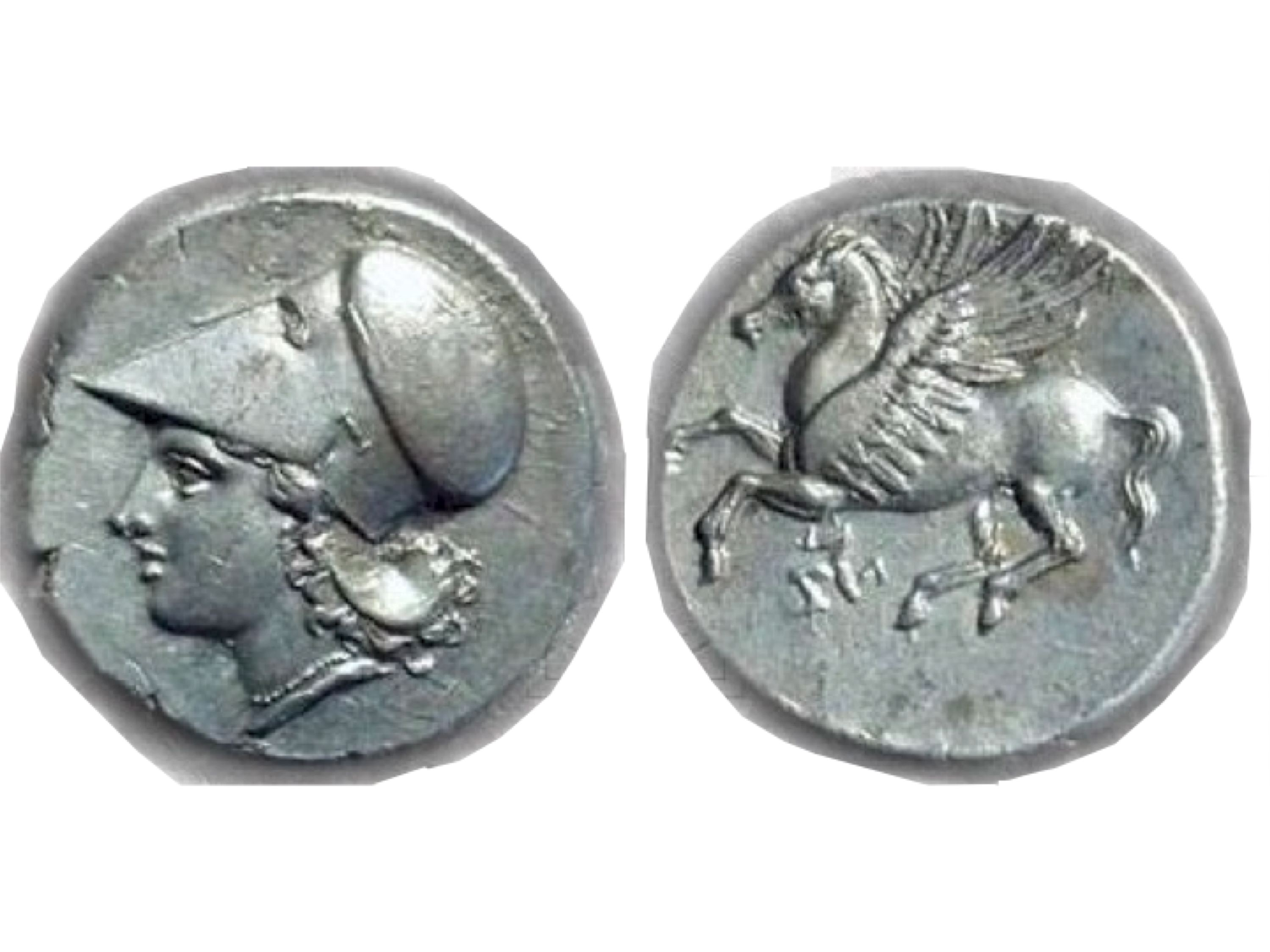 Litra d'argent frappée par Agathocle alors tyran de Syracuse (317-294 AC), représentant au droit une tête d'Athéna et au revers un Pégase avec, sous le ventre, le triskelès qui renvoie à Agathocle.